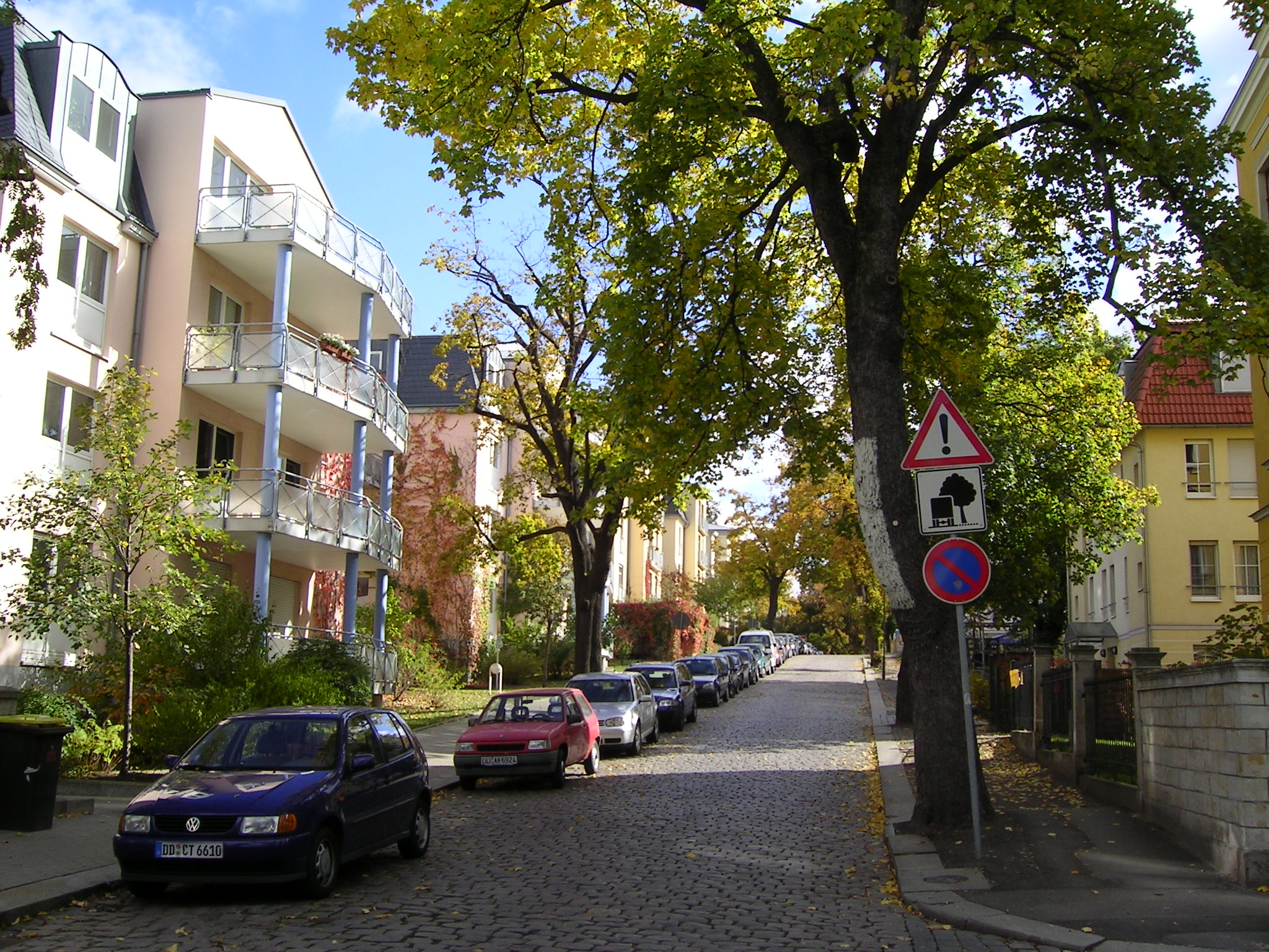 Dresden-Neustadt, Radeberger Vorstadt, Nordstraße